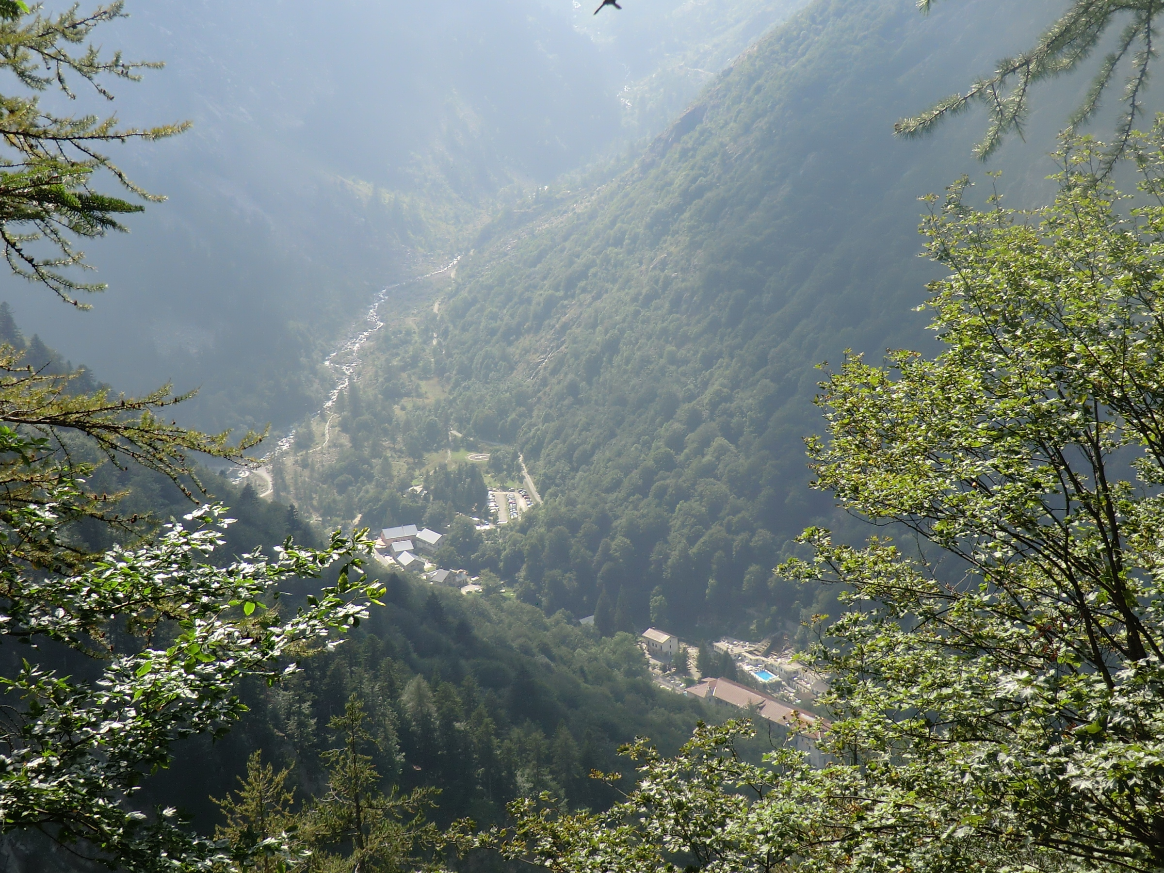 Terme di Valdieri: panorama dal sentiero per il rifugio Morelli Buzzi